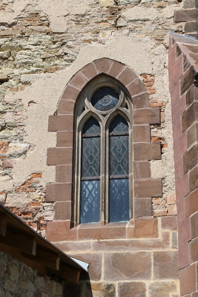 Popis